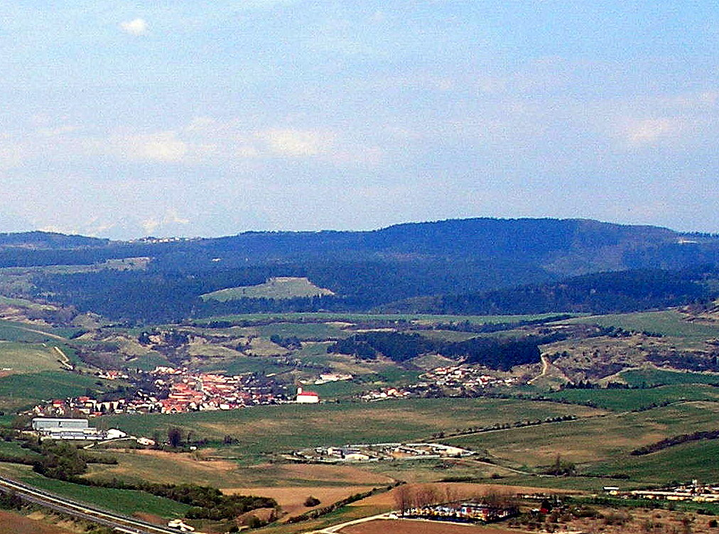 Okolie obce Ordzovany, okres Levoča.